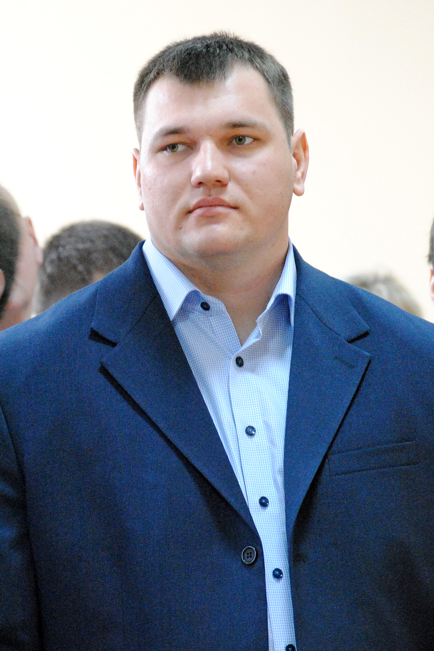 Алексей Ловчев во время открытия ФОК "Олимп" в Александрове (2016).